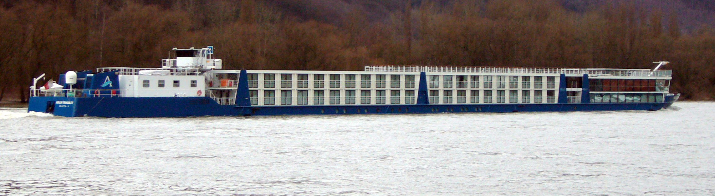 TwinCruiser